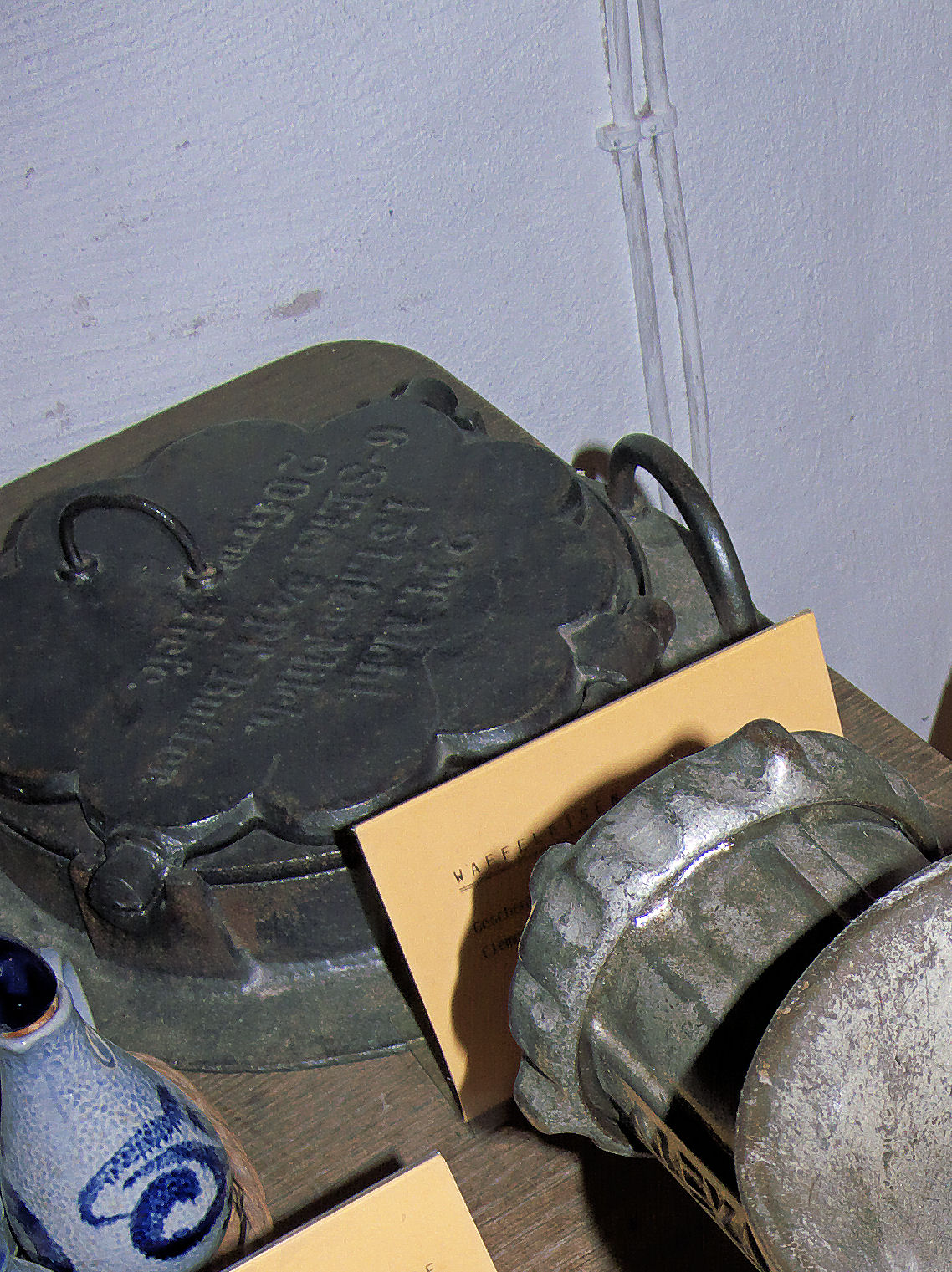 Vijfharten wafelijzer